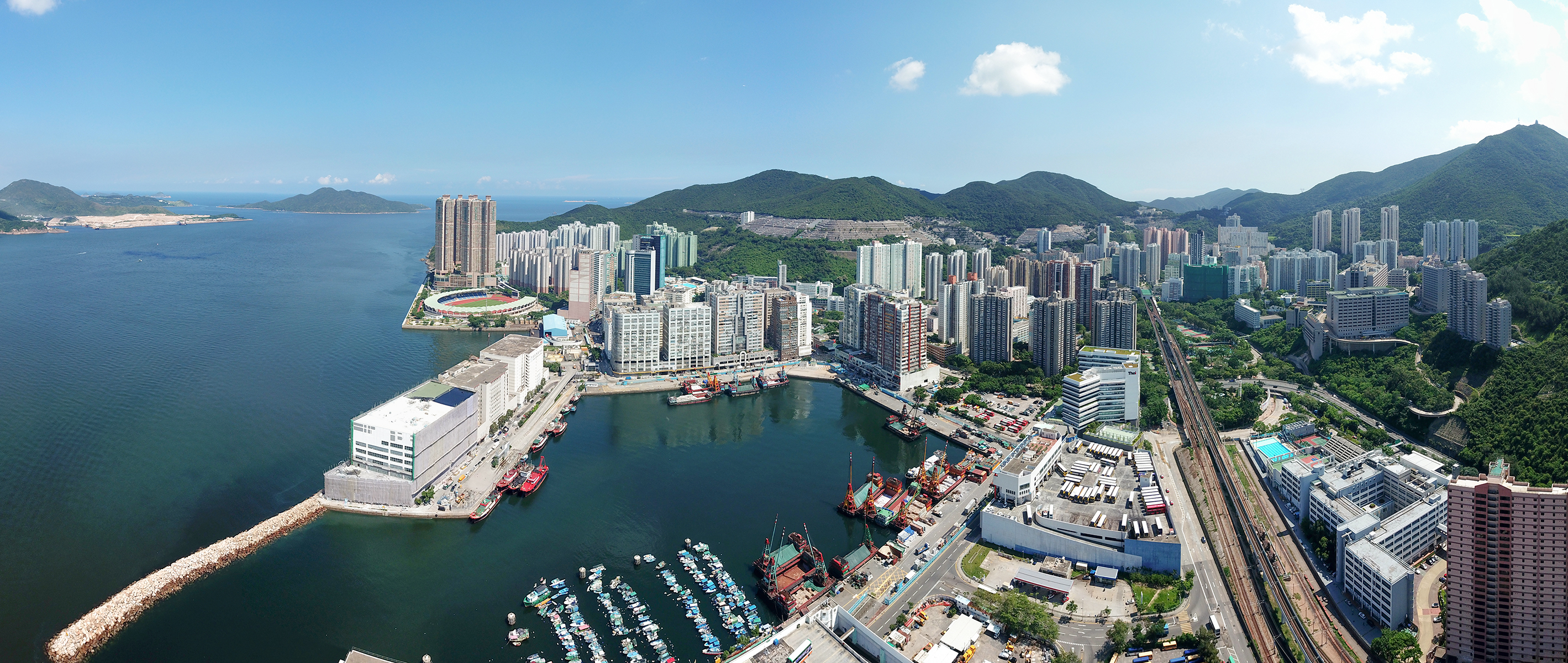 Chai Wan